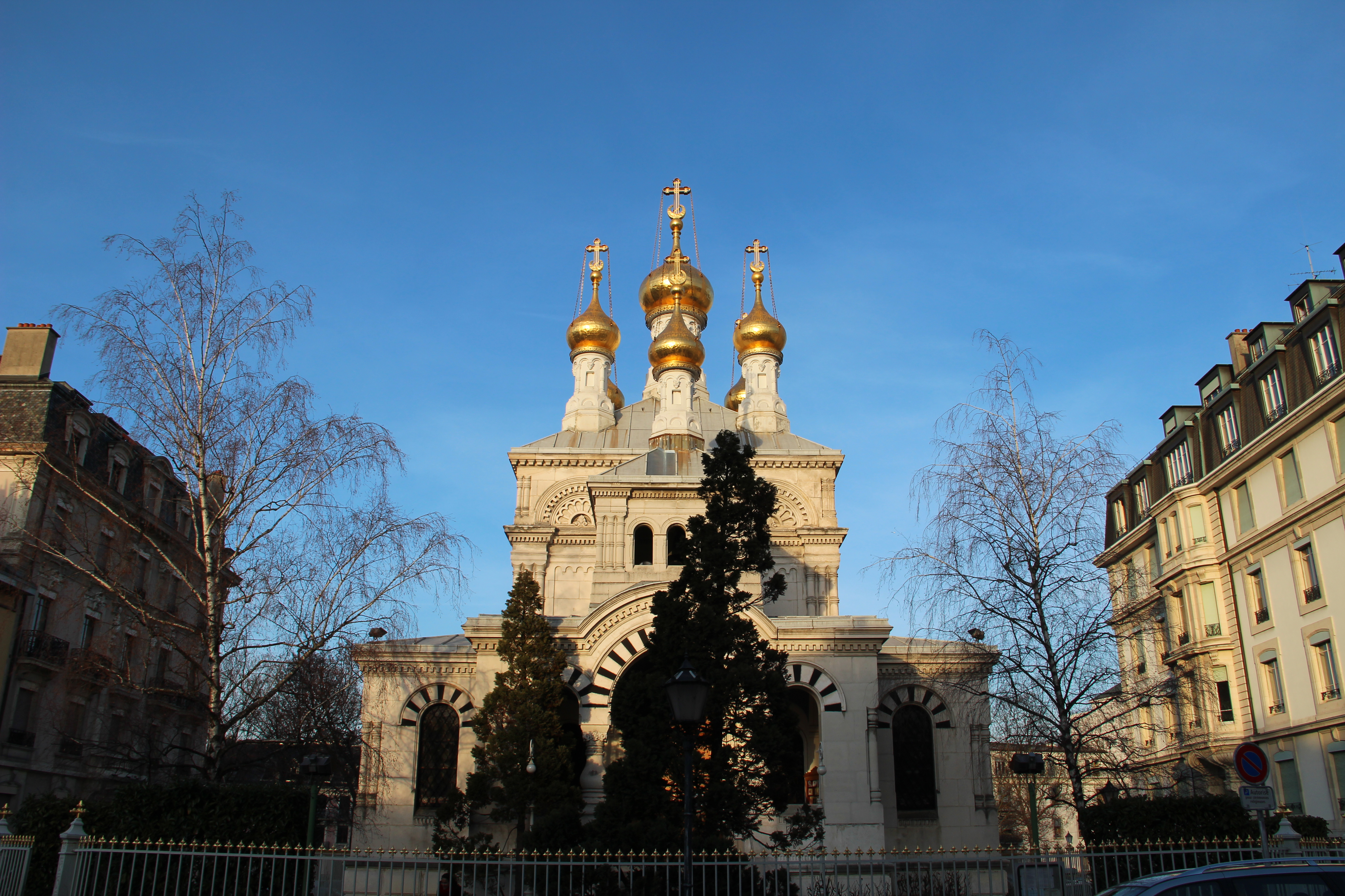 Eglise orthodoxe russe de Genève